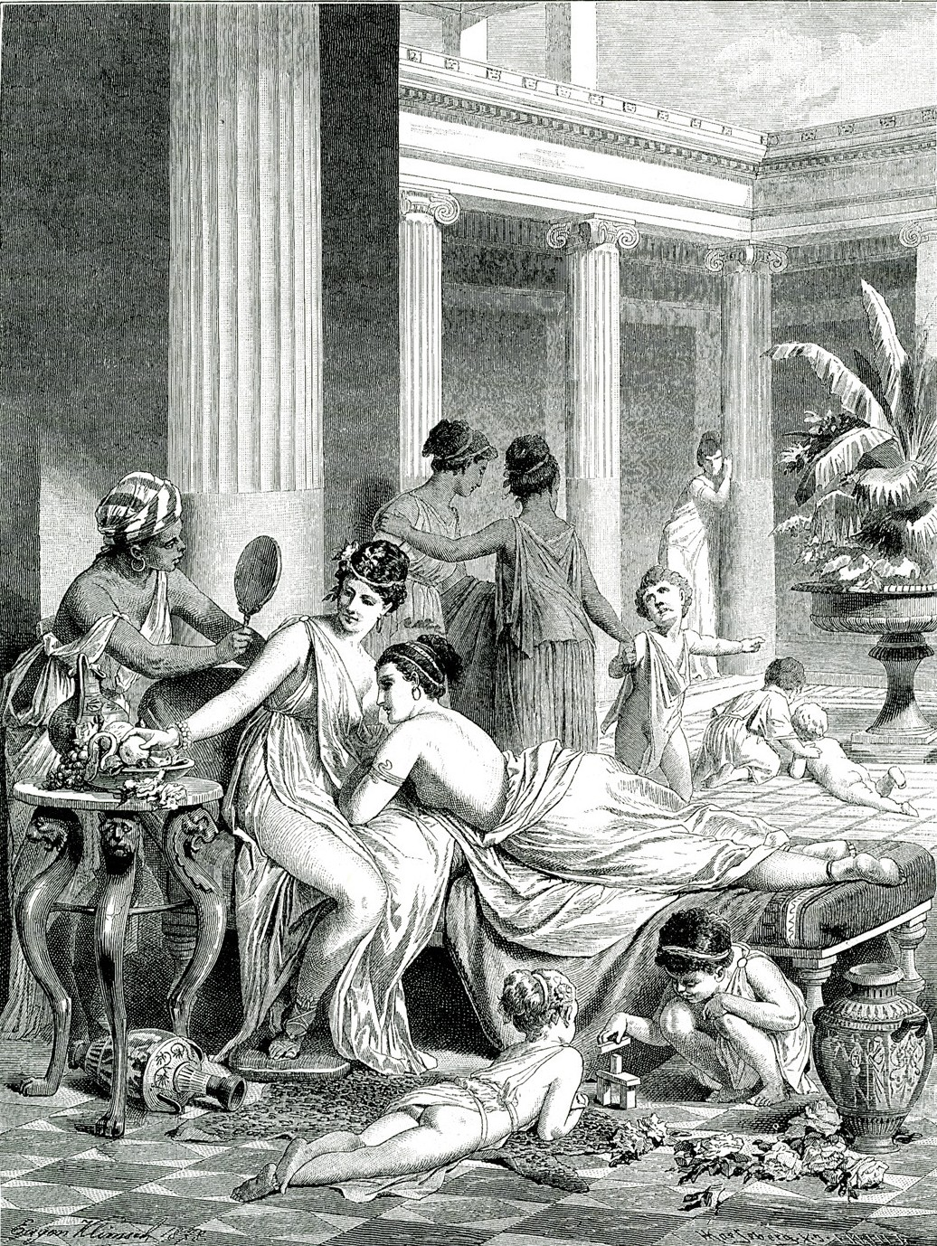 Ιάκωβος Φάλκε. Ελλάς, ο Βίος των Αρχαίων Ελλήνων. Κατά το γερμανικό του Ιακώβου Φάλκε, Ν. Γ. Πολίτης (μετ.), Αθήνα, Κάρολος Βίλμπεργκ, 1887